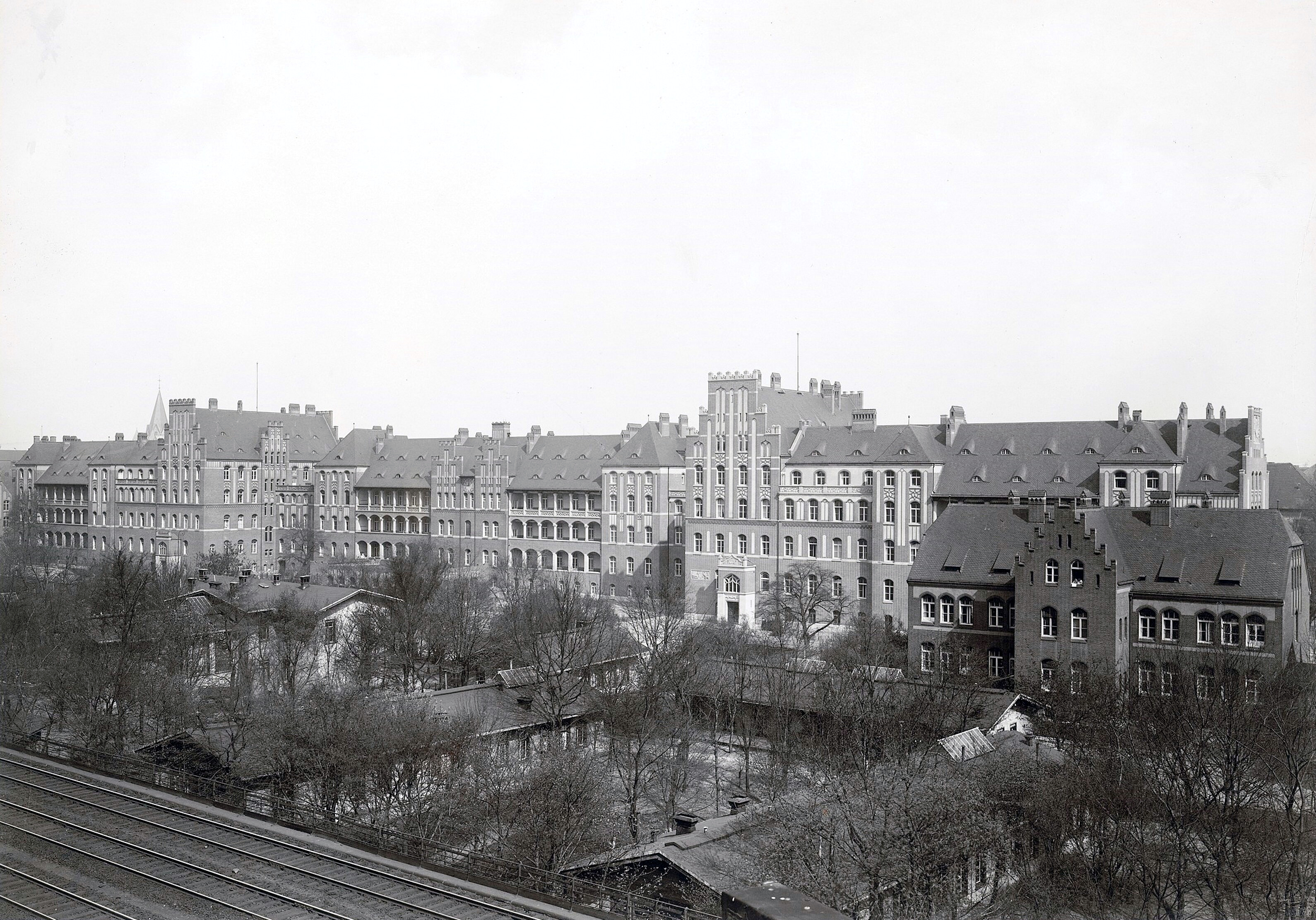 Charité, Gesamtansicht